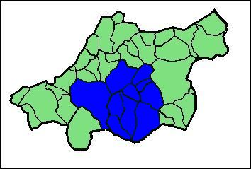 Ezpeletako biperraren sor-markaren hedapena Lapurdin